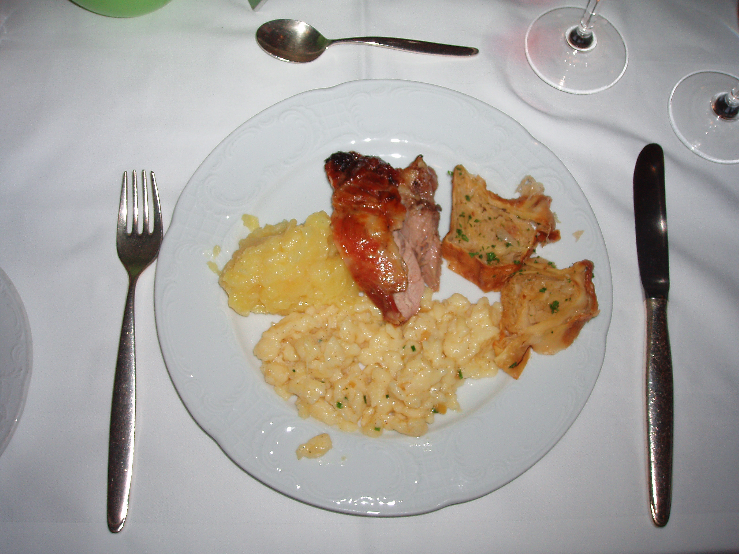 Kartoffelsalat, Kässpatzen, Kalb und Krautkrapfen